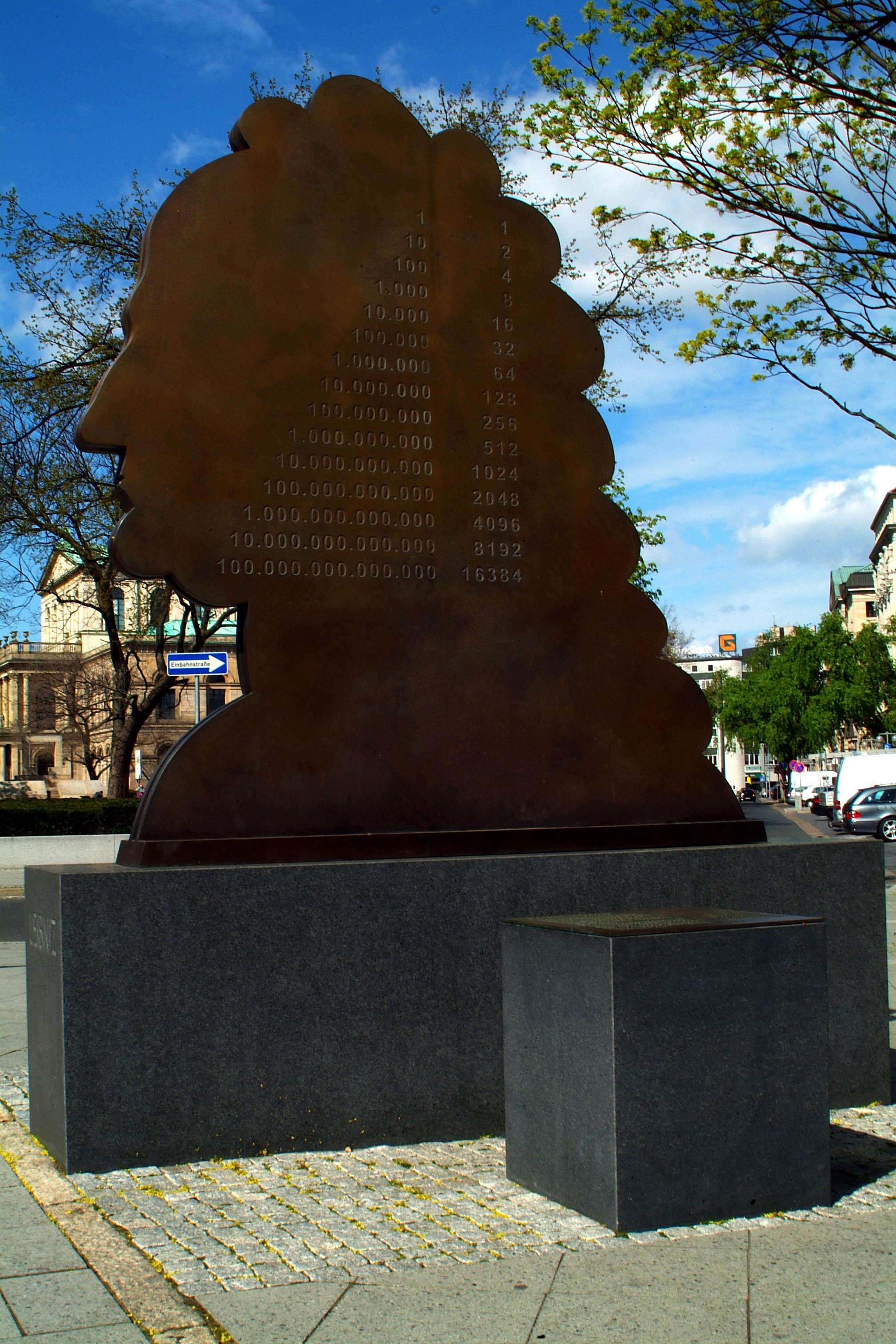 Sie haben ein besseres Bild? Sogar ein historisches Dokument als Bild(ungsförderung)? Zeigen Sie' s uns. Stiften Sie es doch auch - allen Menschen.